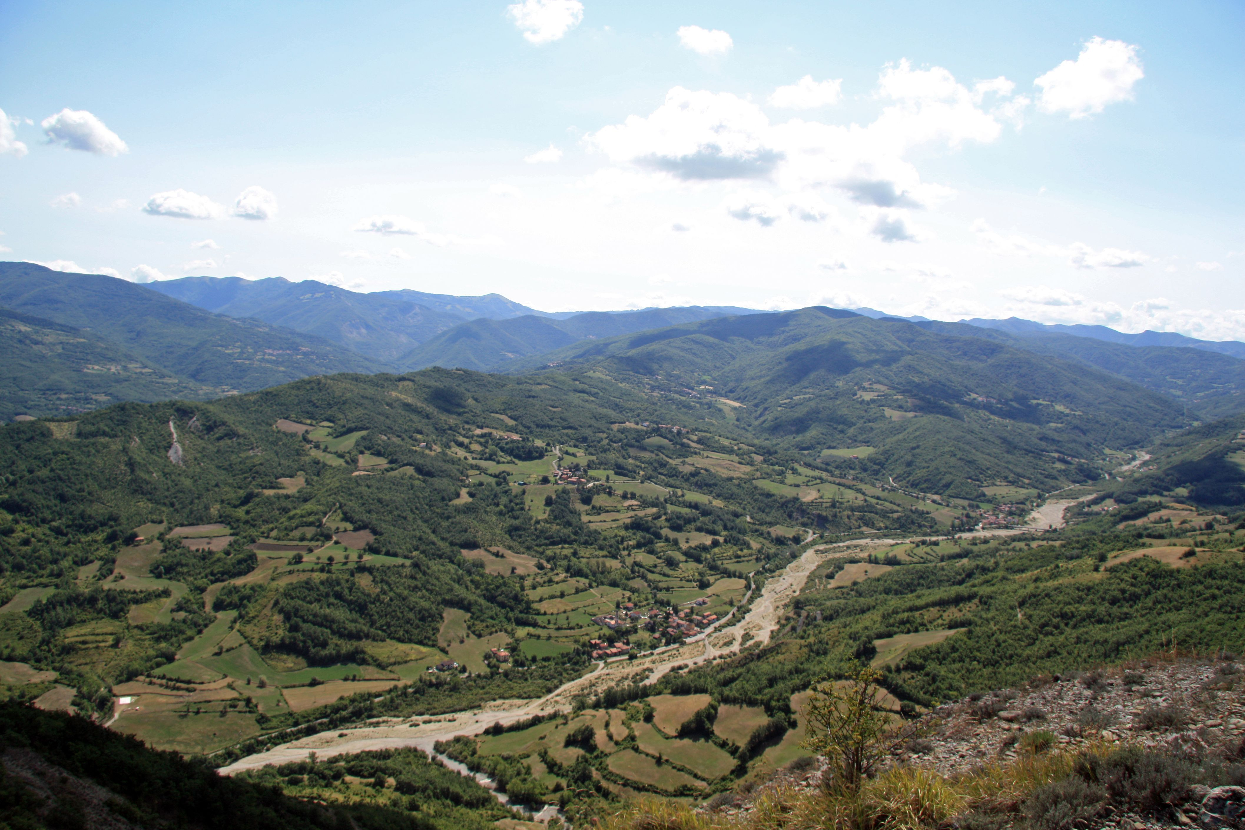 la Val Sisola tributaria della val Borbera.